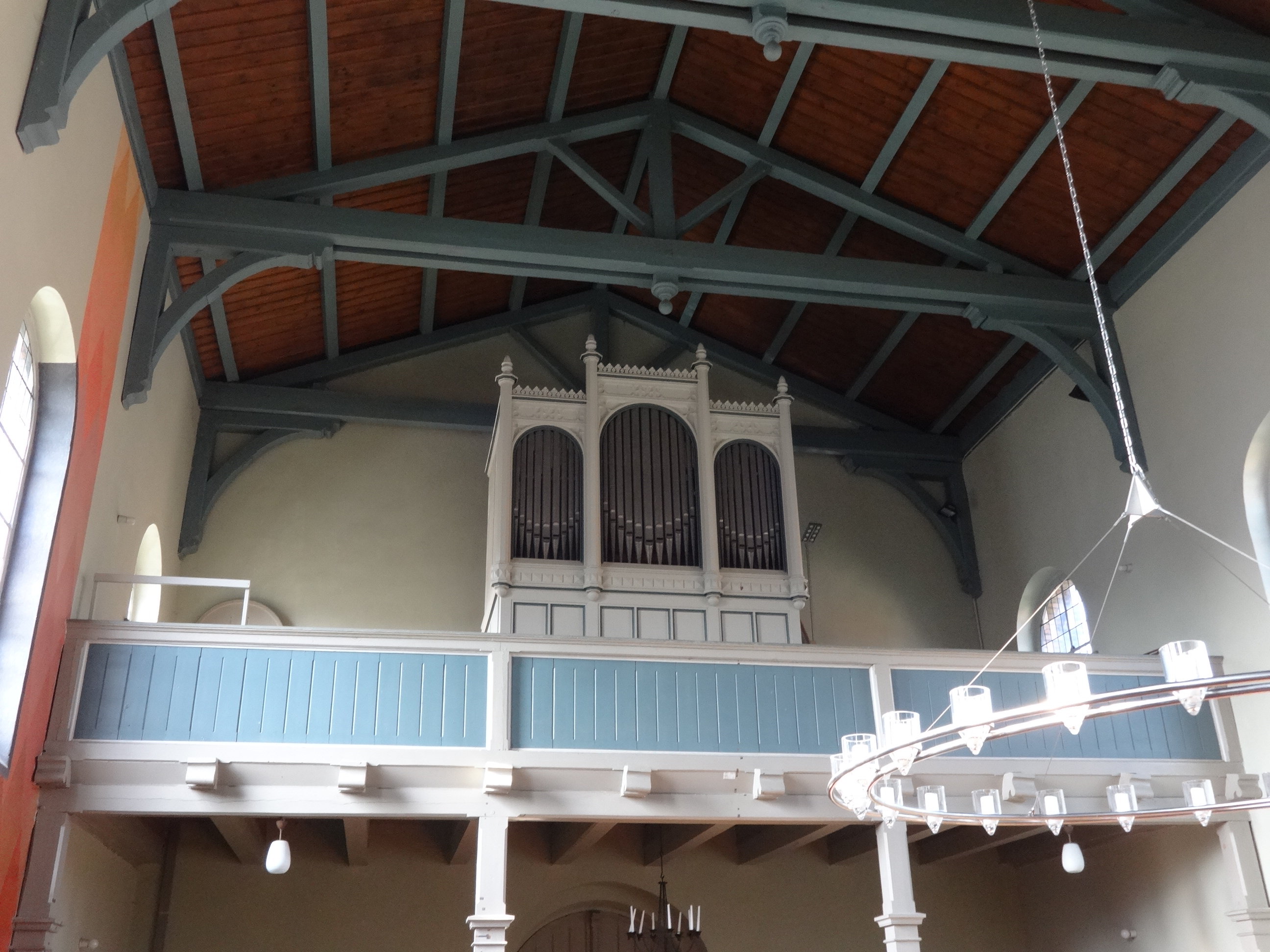 Dorfkirche in Berlin-Rahnsdorf, entstanden 1886 bis 1888 im Rundbogenstil der späten Schinkelschule.